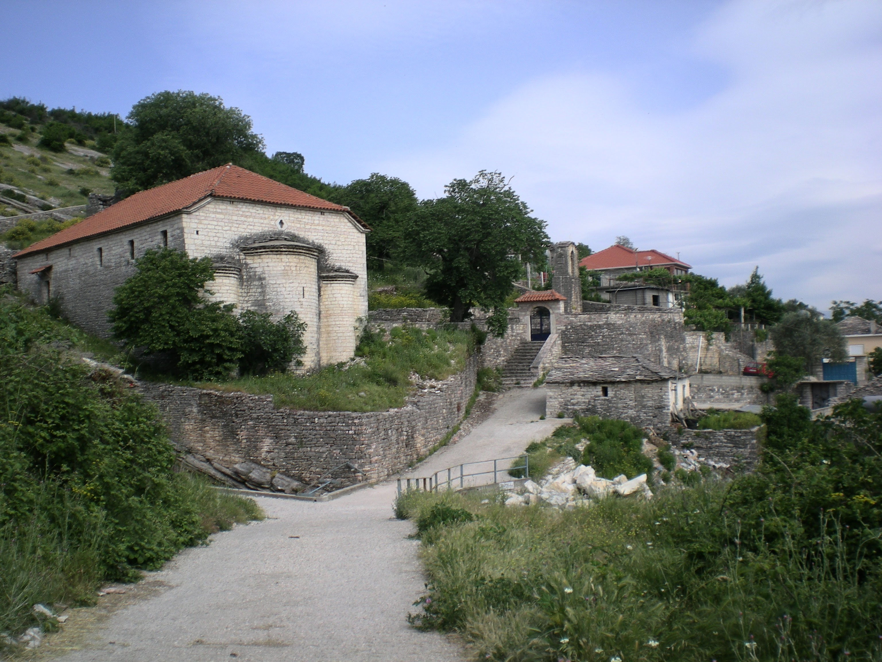 Η Εκκλησία Ευαγγελίστρια του χωριού Σωφρατίκων